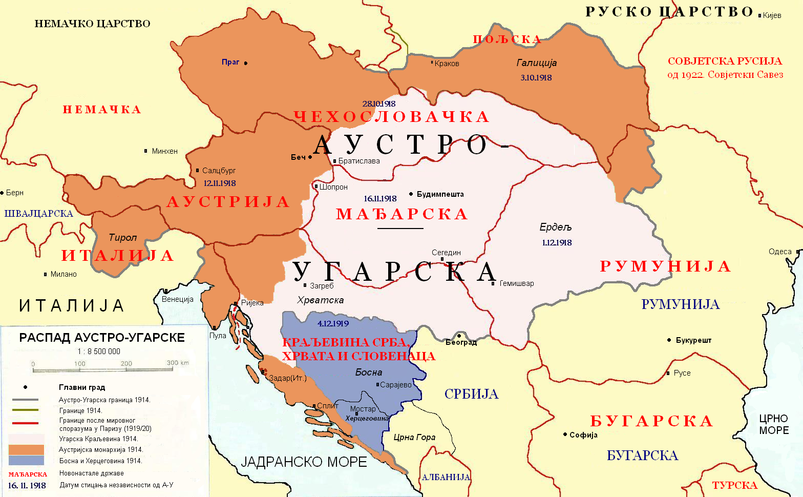 Подела аустроугарских територија после Париске конференције